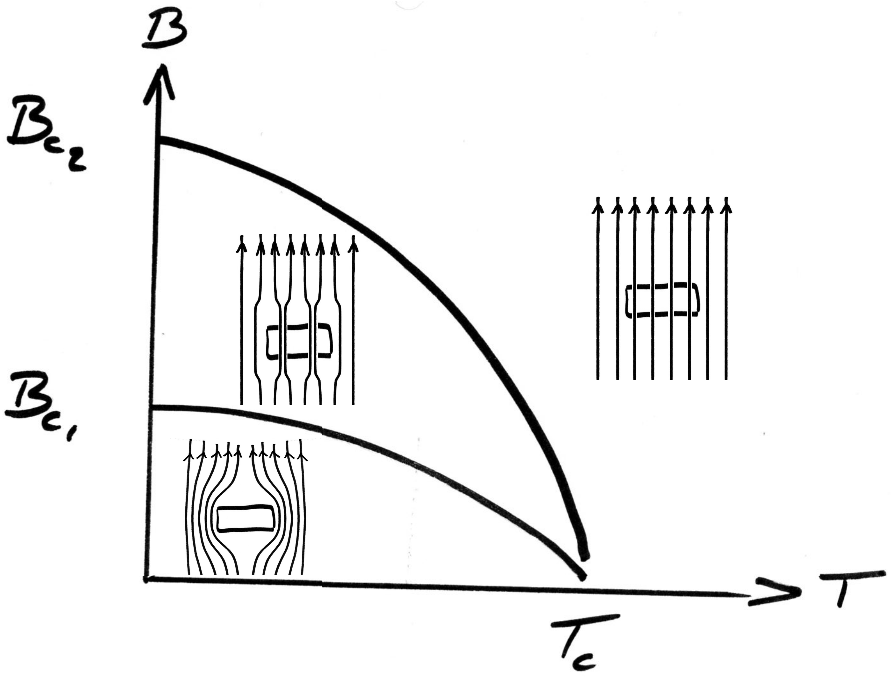 Diagramme de phase (champ, température) dans un supraconducteur de type II : en dessous d'un champ critique Bc1, le matériau est supraconducteur et exclue complètement le champ magnétique. Entre Bc1 et Bc2, le supraconducteur est dans un état mixte avec présence de vortex. Tc est la température critique du supraconducteur à champ nul.